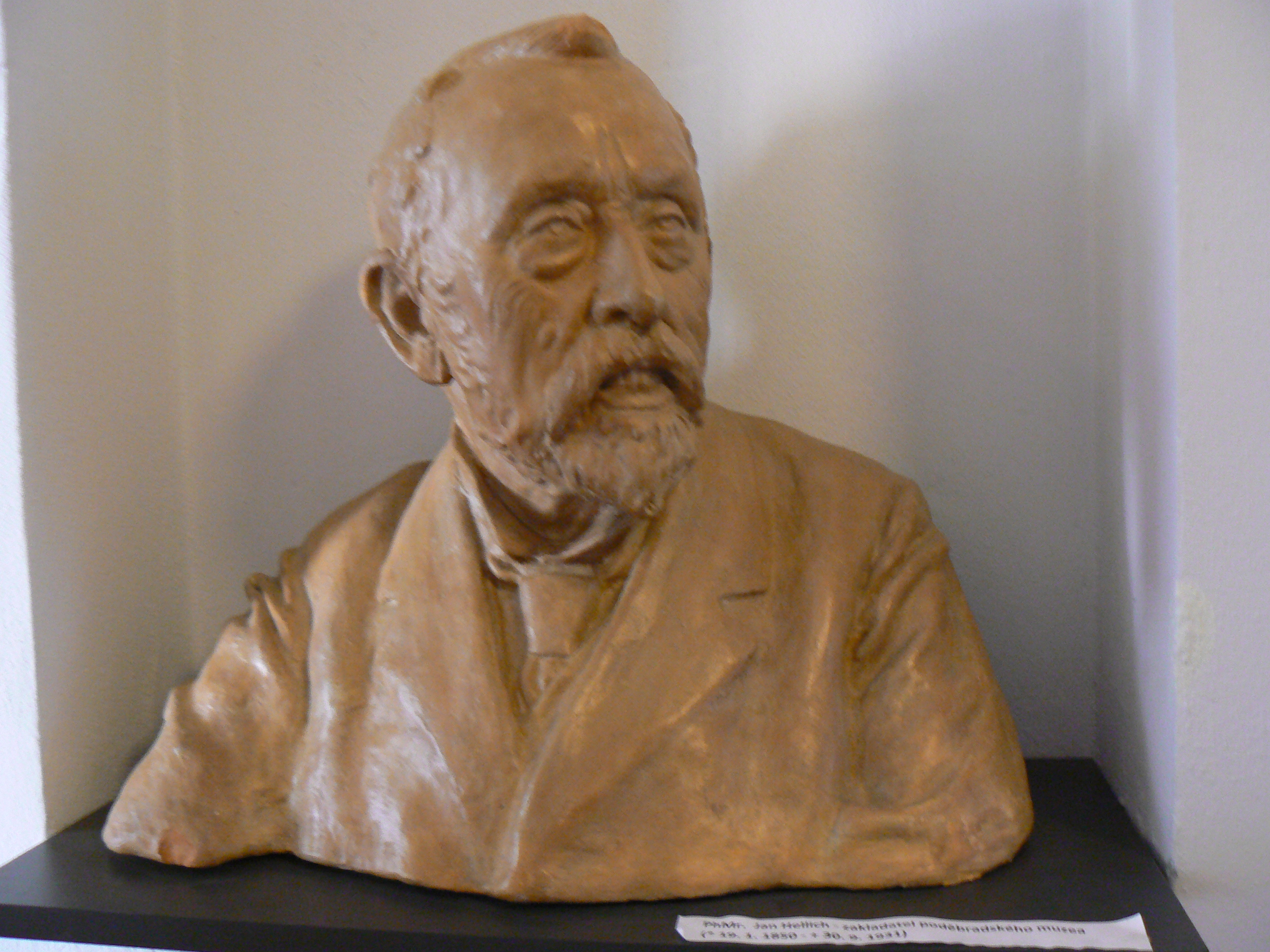 PhMr. Jan Hellich, (19. 1 1850 - 30. 9. 1932), zakladatel Poděbradského muzea. Bysta v Poděbradském muzeu.